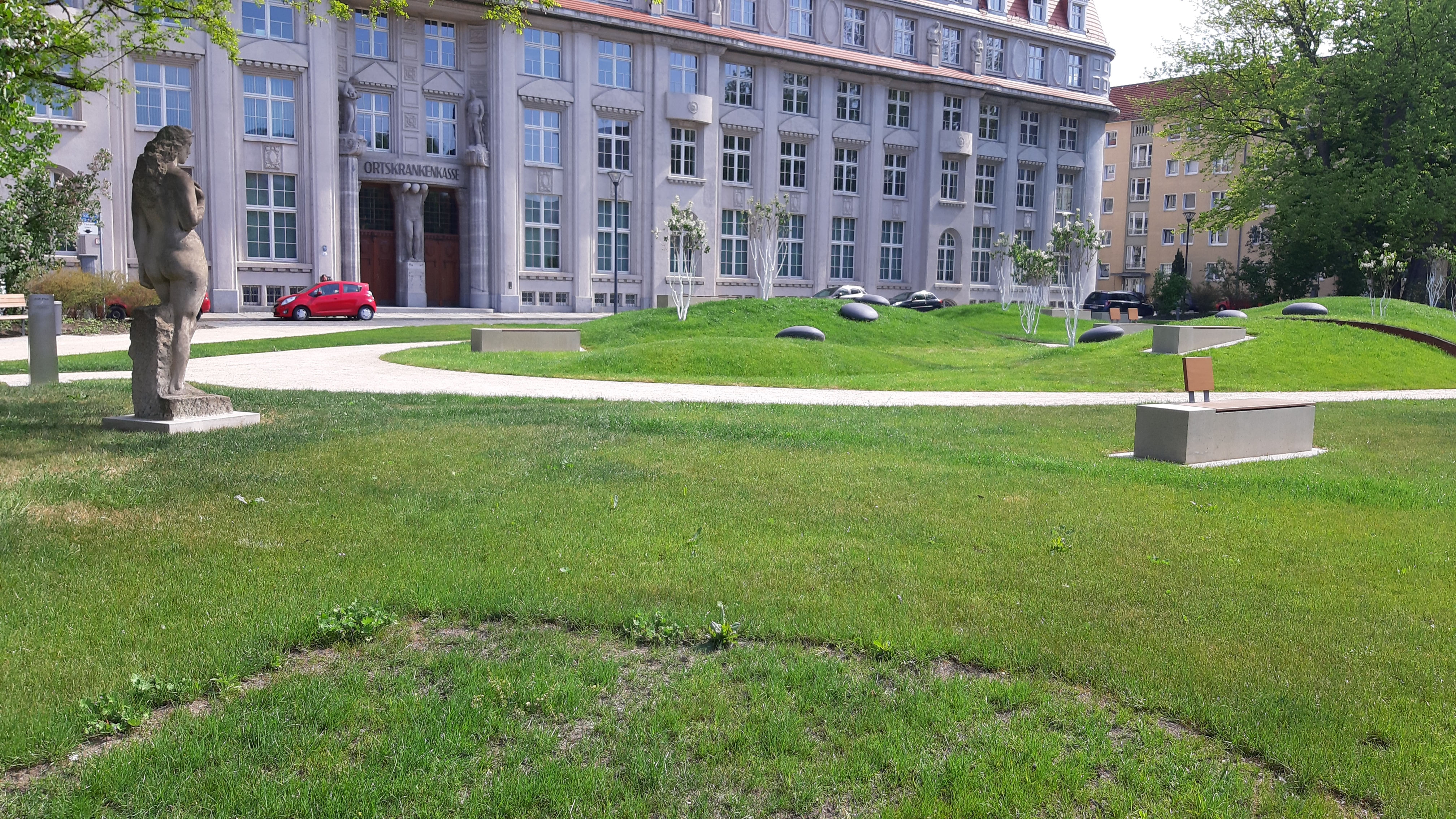 Der Sternplatz in Dresden nach der Neugestaltung 2020